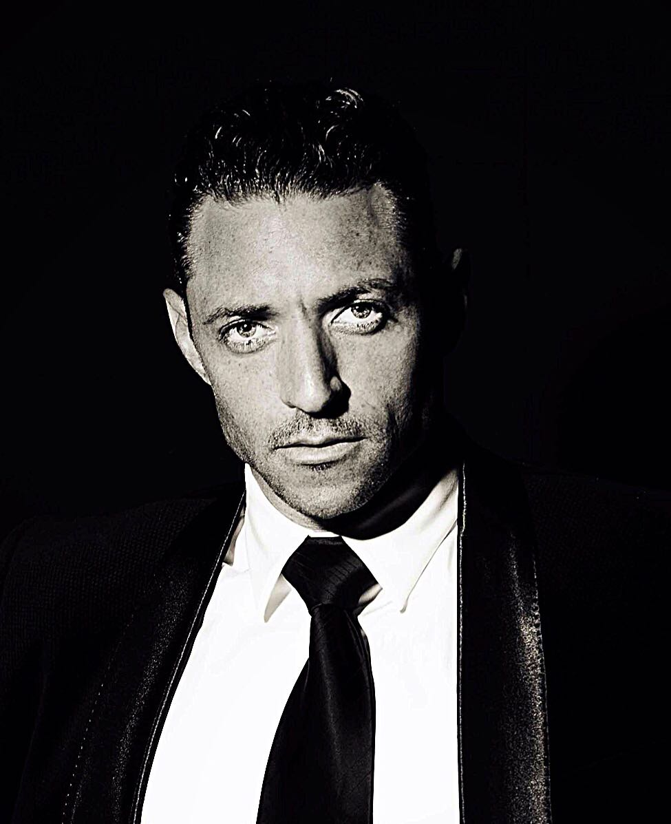 Carlos García Barrett